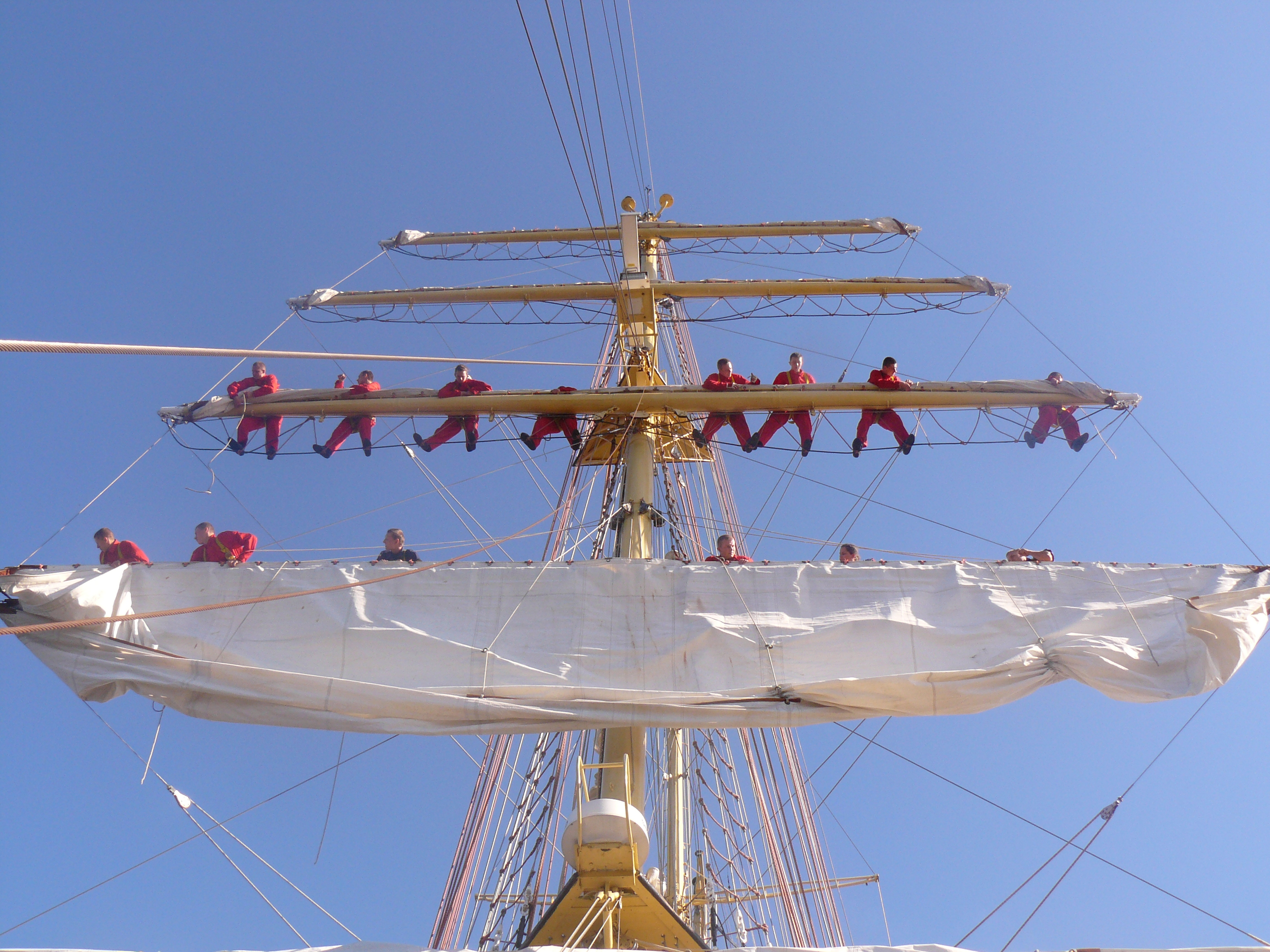 Alarm do żagli.Klarowanie żagli na foku.Zdjęcie powstało w Kotce podczas regat Tall ships Races 2007 Baltic.